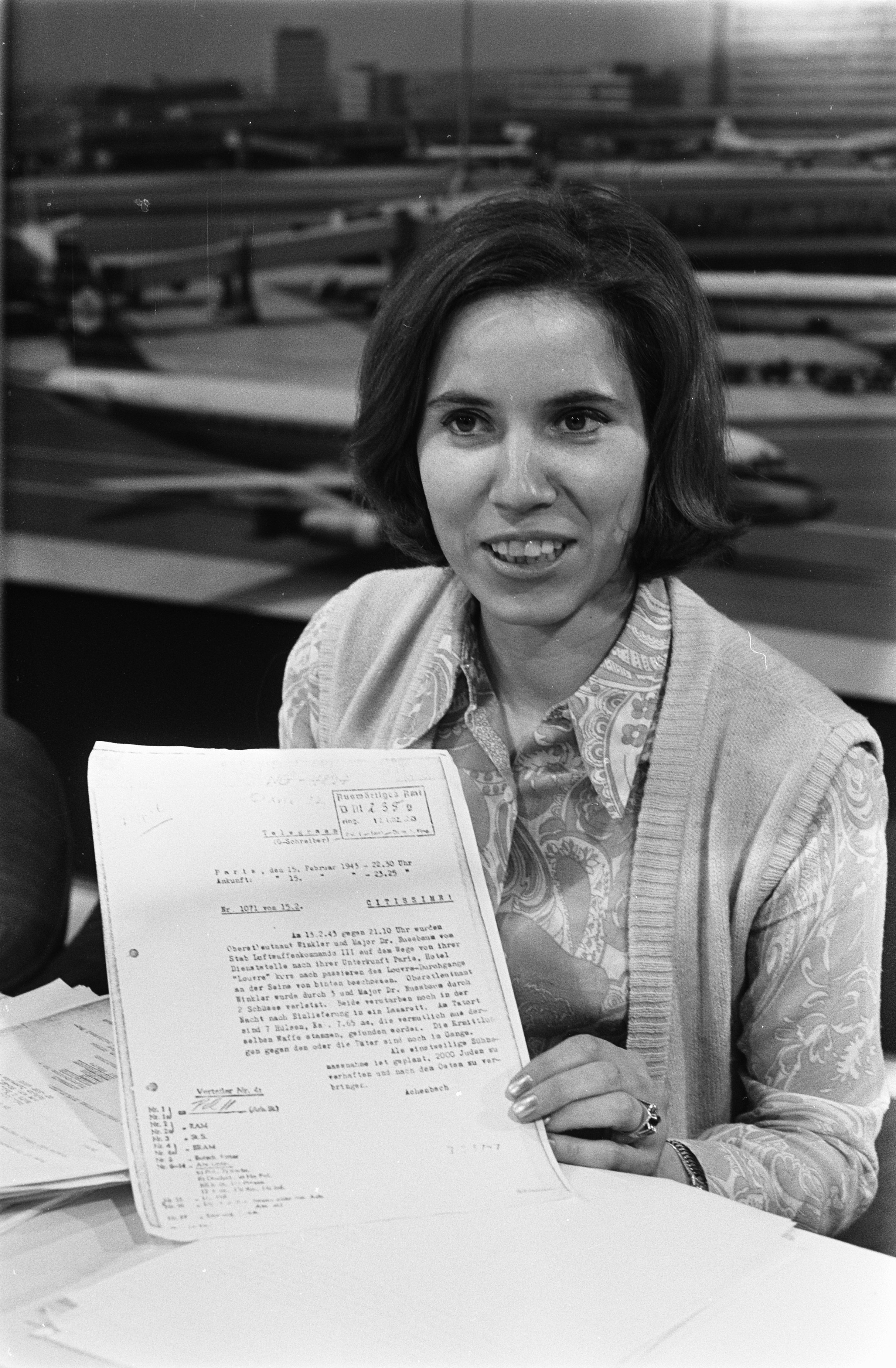 Collectie / Archief : Fotocollectie Anefo Reportage / Serie : [ onbekend ] Beschrijving : Journaliste Beate Klarsfeld (West-Duitsland) op Schiphol met beschuldigingen tegen Ernst Achenbach . Beate Klarsfeld met document Datum : 7 april 1970 Locatie : Noord-Holland, Schiphol Trefwoorden : jodenvervolgingne, journalisten, tweede wereldoorlog Persoonsnaam : Achenbach Ernst, Klarsfeld Beate Fotograaf : Verhoeff, Bert / Anefo Auteursrechthebbende : Nationaal Archief Materiaalsoort : Negatief (zwart/wit) Nummer archiefinventaris : bekijk toegang 2.24.01.05 Bestanddeelnummer : 923-4127